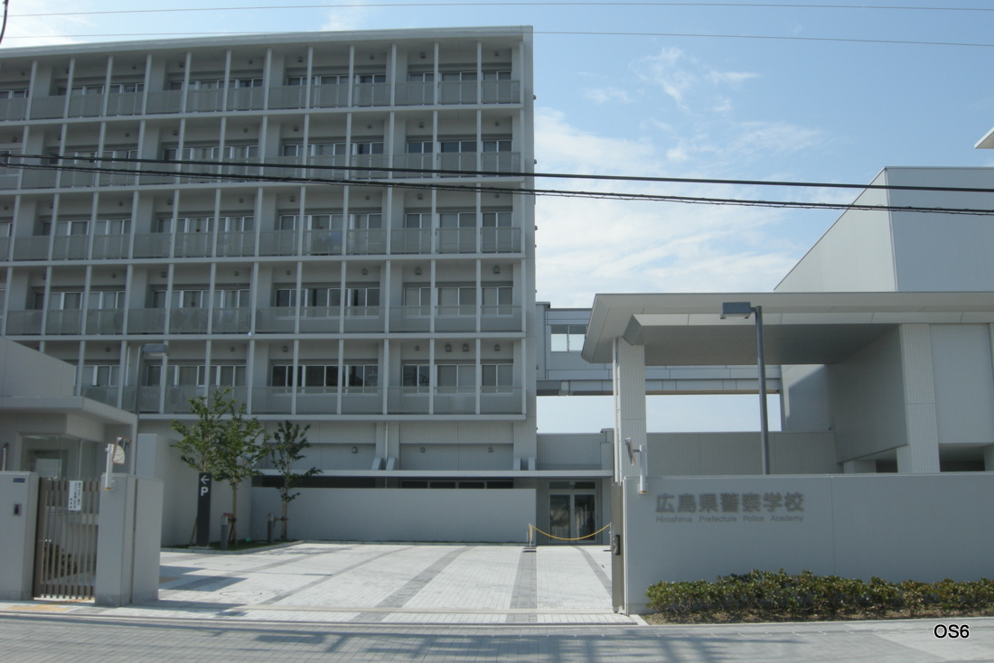 広島県坂町の広島県警察学校